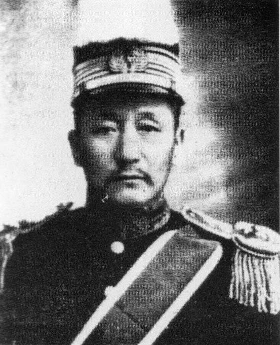 General Xue Zhi-Heng (Hsieh Chih-Heng) (b.1876,d.1933)